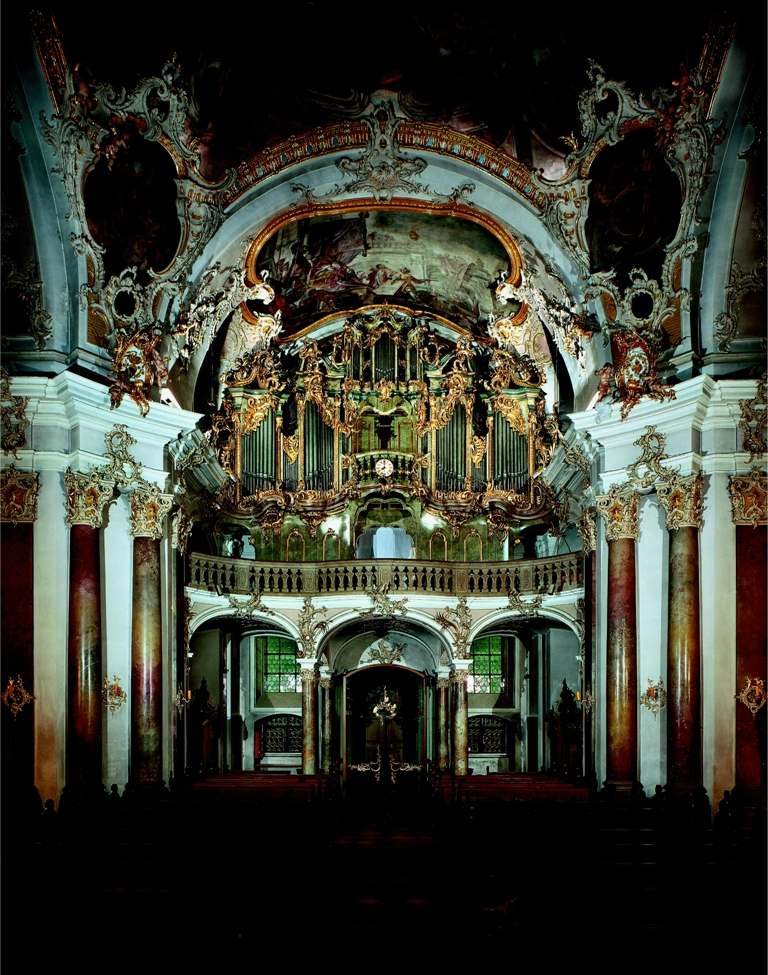 Ansicht der Vleugels-Orgel im Käppele Würzburg